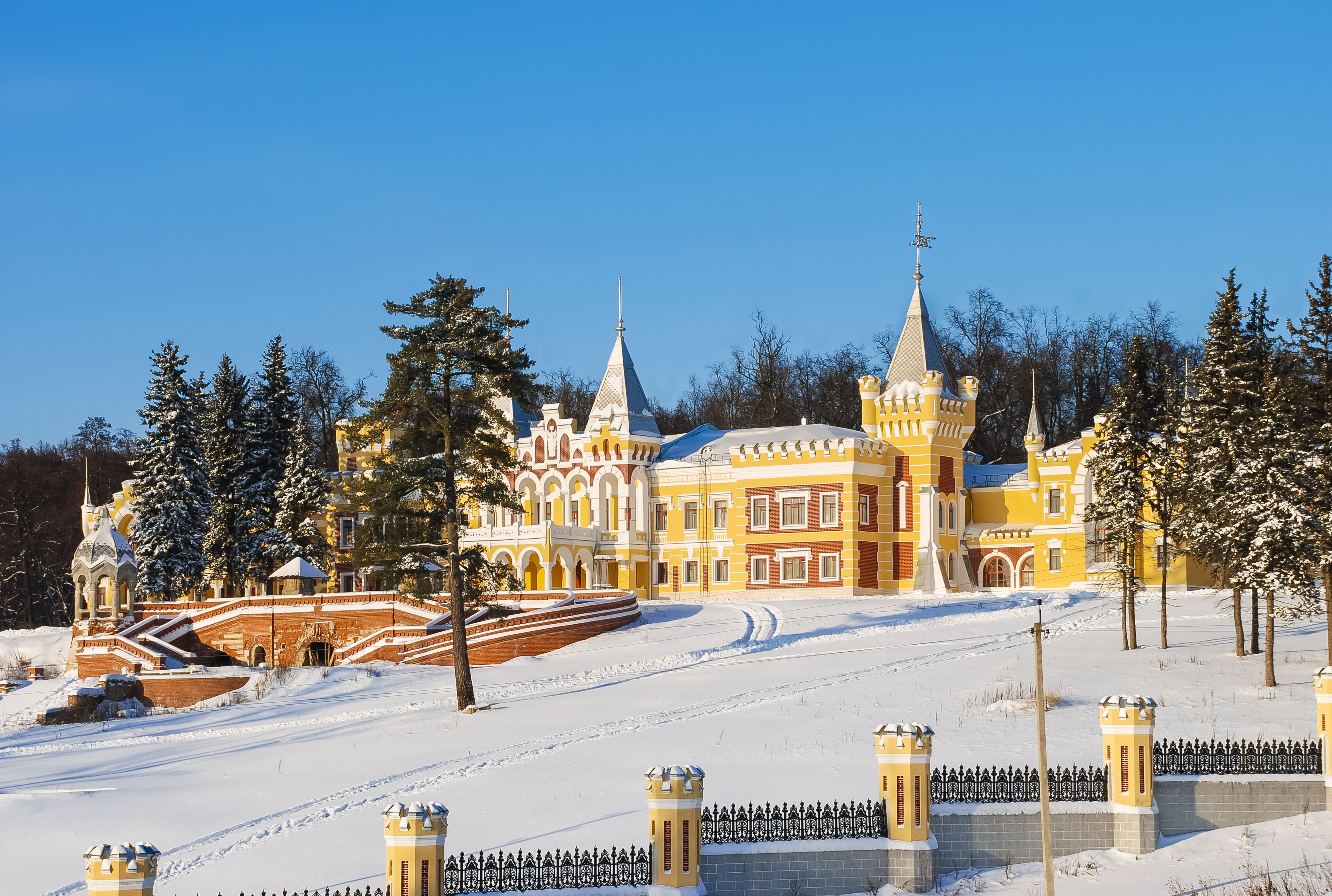 Усадьба фон Дервиза: Кирицы, Спасский район, Рязанская область